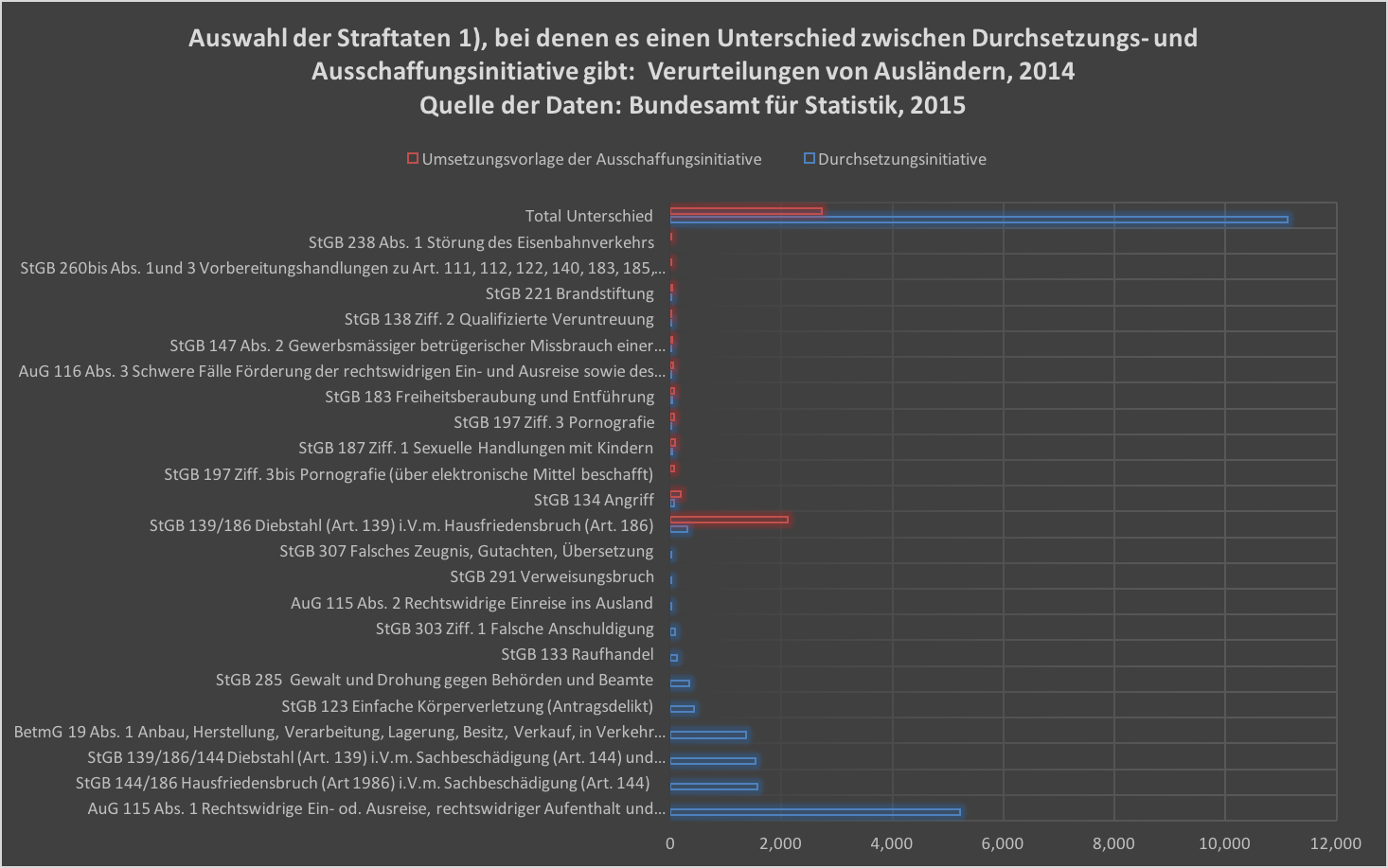 Darstellung der Daten aus: Querschnittsthemen – Daten, Indikatoren Ausländer und Strafrecht Umsetzung der Ausschaffungsinitiative des BFS, 2015